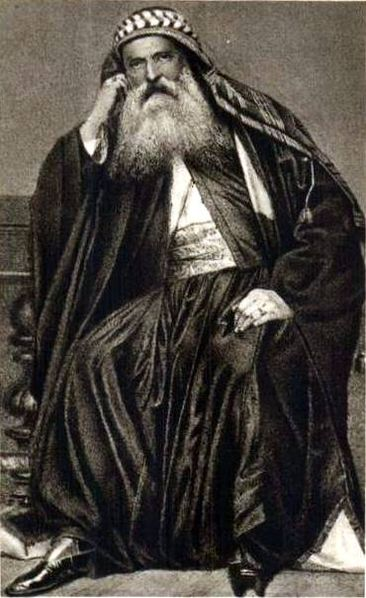 Джованни Миани